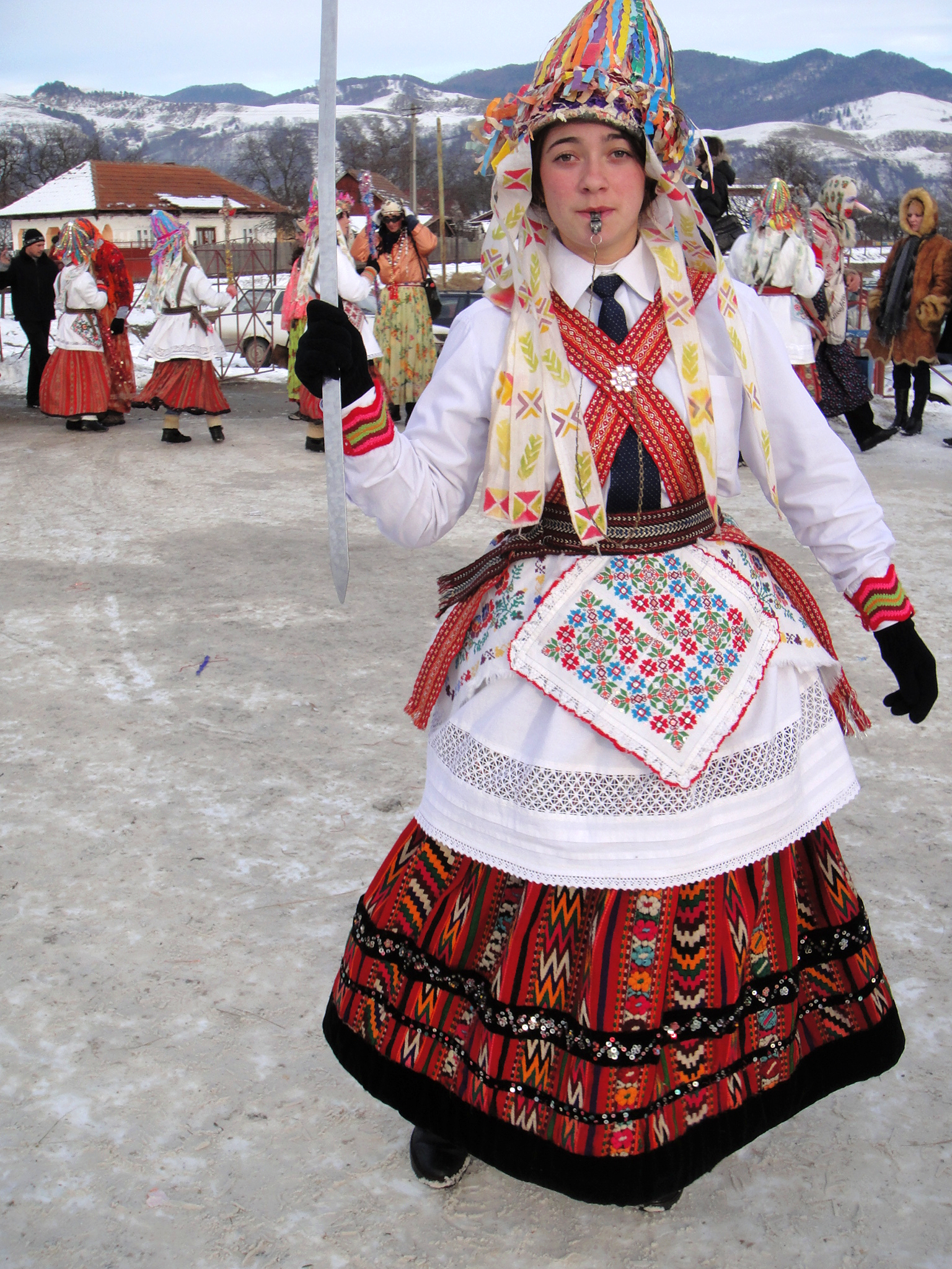 Dormánfalvi (rom. Dărmăneşti, Moldva) legény szilveszter napján viseletben.